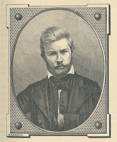 Hans Egede Schack